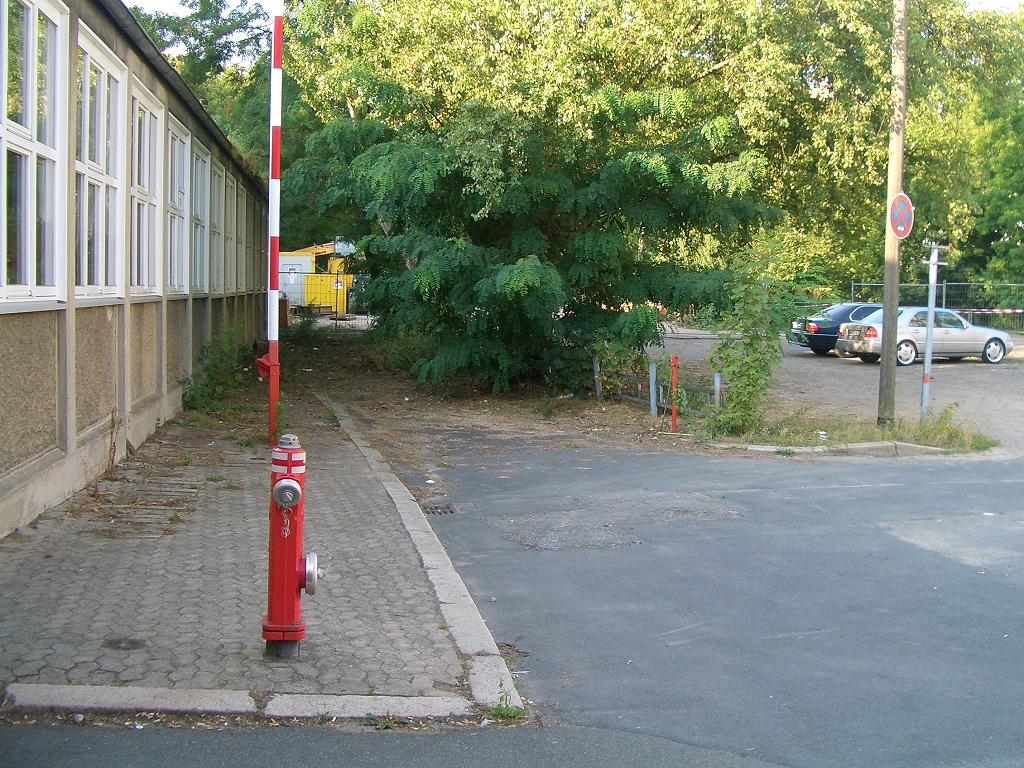 Reste der früheren Straße Nickelnkulk in Braunschweig Höhe Geiershagen. Die linke Bordsteinkante gehört zum Nickelnkulk.